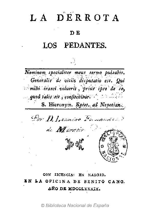 La derrota de los pedantes Autor: Fernández de Moratín, Leandro (1760-1828) Fecha: 1789 Datos de edición: En Madrid en la Oficina de Benito Cano